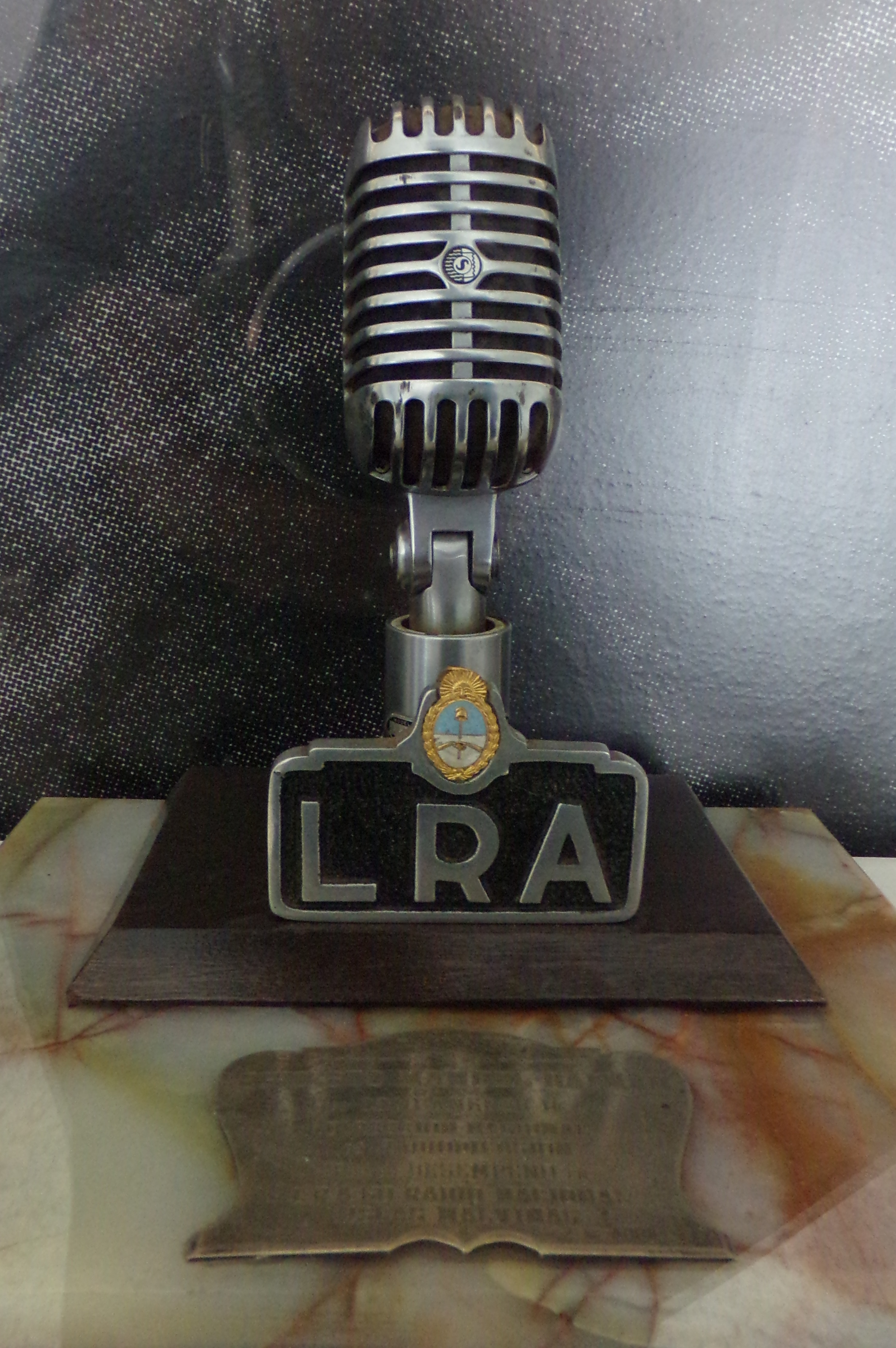 Micrófono de LRA60 Radio Nacional Islas Malvinas utilizado en Puerto Argentino durante la guerra de 1982. Se exhibe en el Museo Malvinas de Buenos Aires.